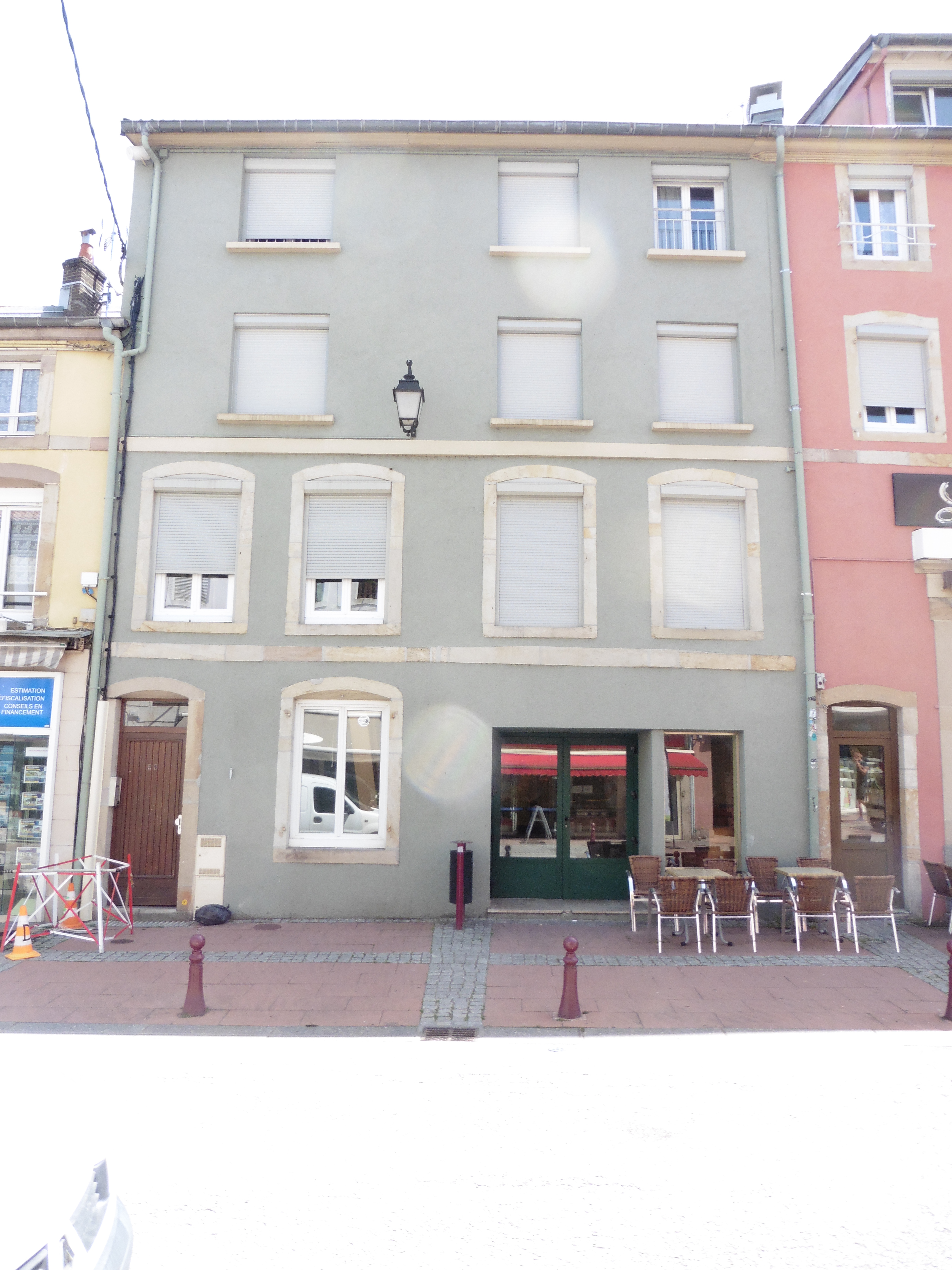 Logement de Bachelard 10 rue de la Xavée à Remiremont entre 1903 et 1905.